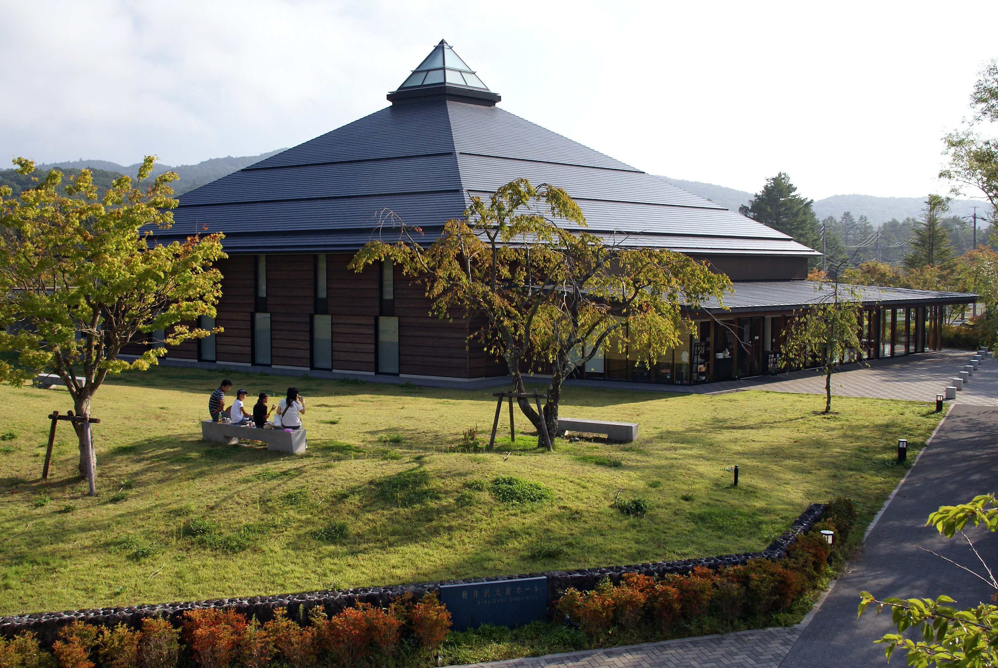 Ohga Hall in Karuizawa, Japan